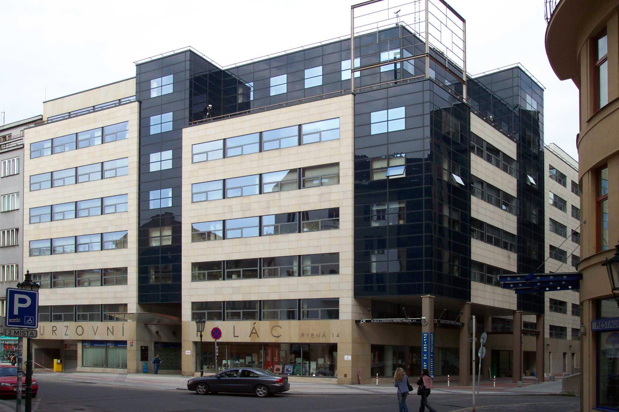 Czech stock exchange (bourse) building - Budova České burzy